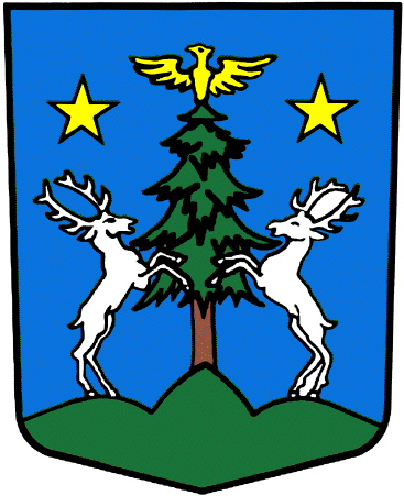 Wappen der Gemeinde Nax Kanton Wallis Schweiz